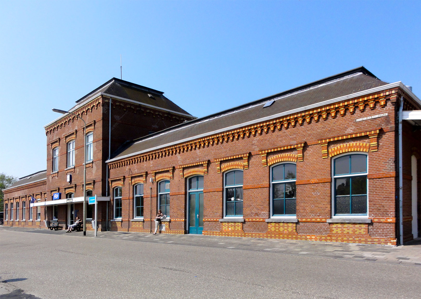 Station van Delfzijl (perronzijde)